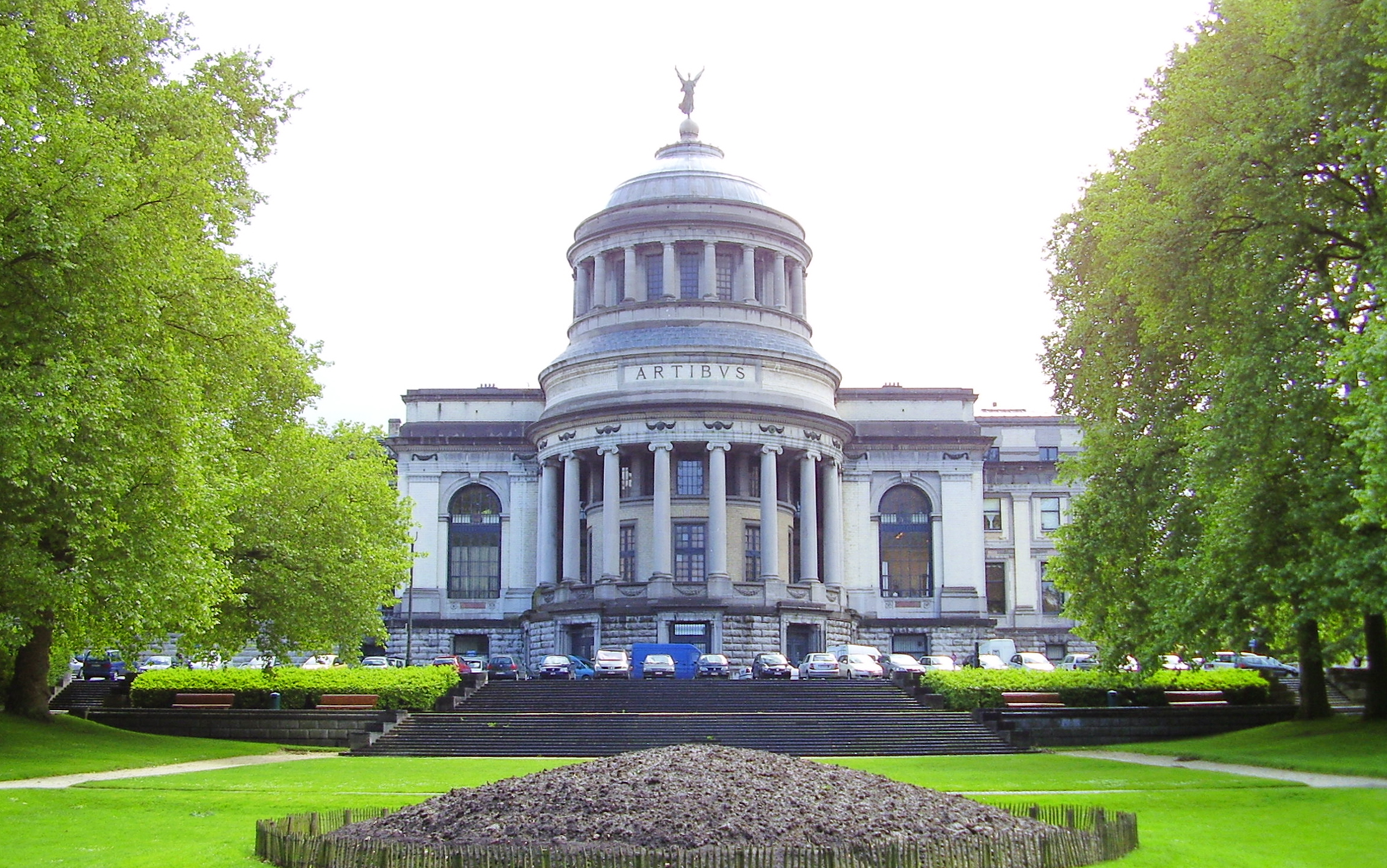 Description: Musée royal d'Art et d'Histoire, Cinquantenaire - Bruxelles Author: User:Ben2 Date of creation: 17 juin 2006 Source: Photo personnelle